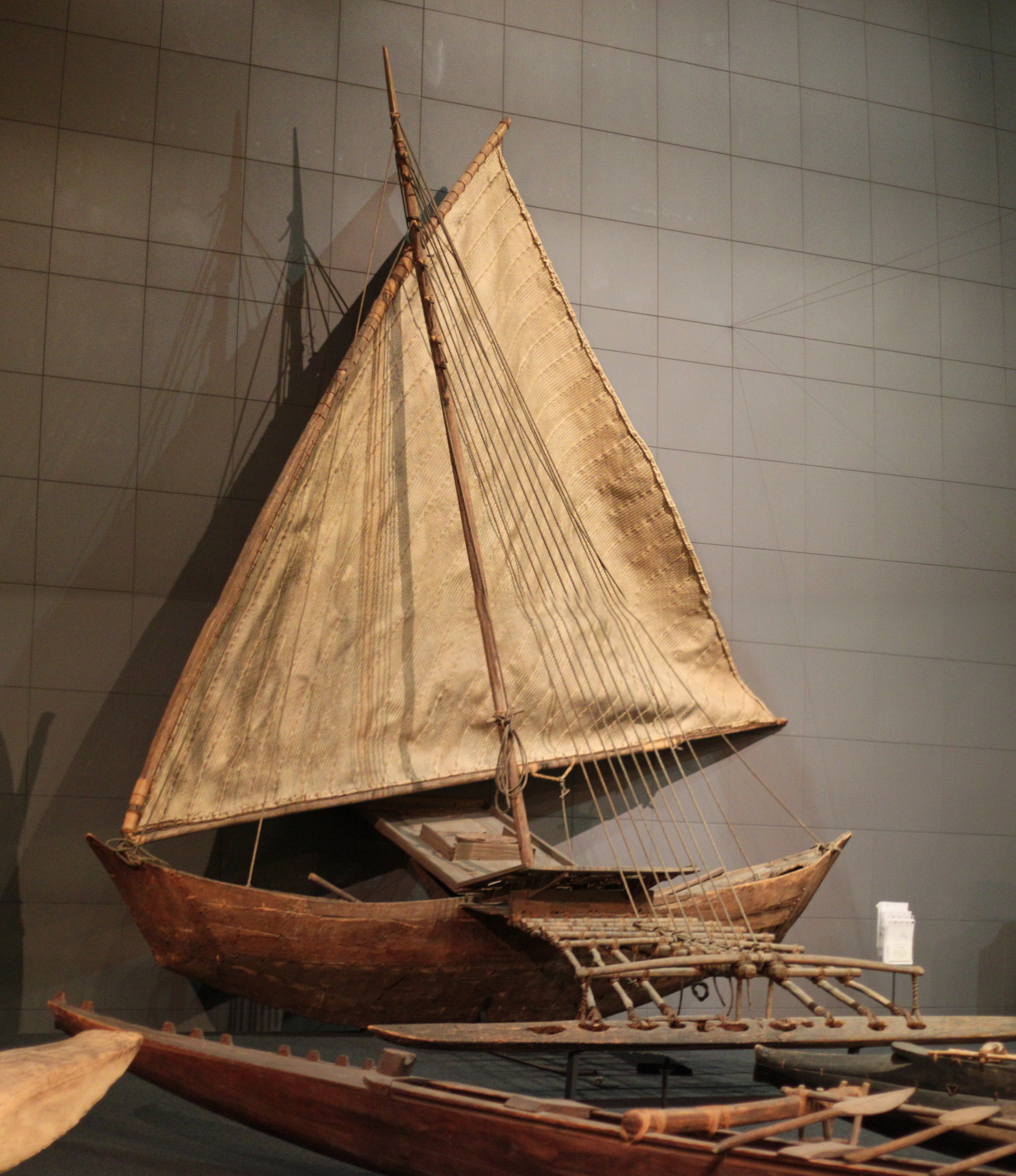 Ausleger-Segelboot (wa), Jaluit; Marshall-Inseln; Der Rumpf diese Segelbootes ist mit Muschelklingen-Querbeilen aus dem Holz des Brotfruchtbaumes gearbeitet und besteht aus einer scharfgeschnittenen Kielpartie, mehreren seitlichen Plankenstücken und Stevenaufsätzen. Die Wandungen sind asymmetrisch, d. h. auf der Auslegerseite nach außen gewölbt und auf der gegenüberliegenden Leeseite steil abfallend und gerade. Damit soll der Abdrift druch den Schwimmer entgegengewirkt werden. Die Rumpfenden sind gleich geformt. Beim Wendemanöver bringt man die Spitze des ozeanischen Lateinsegels zum anderen Bootsende und neigt den Mast in die rückwärtige Richtung. Das hier restaurierte Segel bestand ursprünglich aus einem Geflecht von Pandanussblattstreifen. Das Boot kann ca. 12 Personen transportieren, die Reisenden halten sich auf den Plattformen auf. Drei Männer werden zum Steuern, Wenden und WAsserschöpfen benötigt. Das Boot wurde 1880 auf den Marschall-Inseln vom Häuptlich Loik erworben.